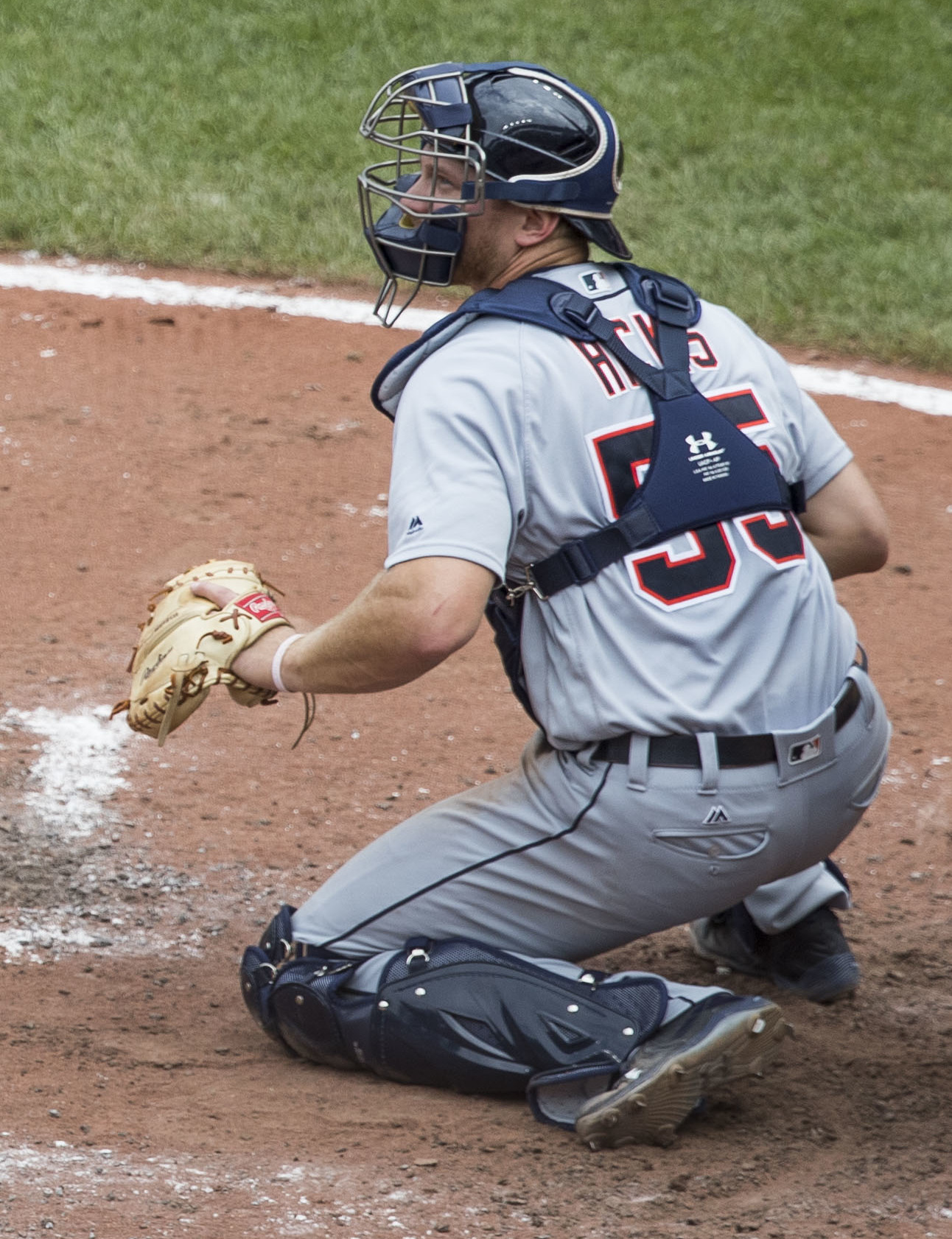 Tigers at Orioles 8/6/17